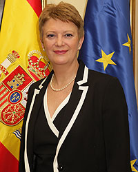 La política española Consuelo Rumí